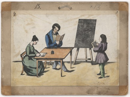 Scene fra en skolestue ca.1863